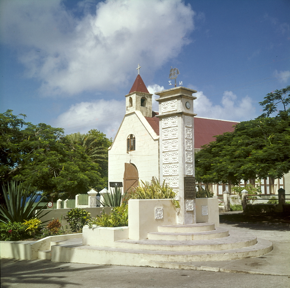 Dia.